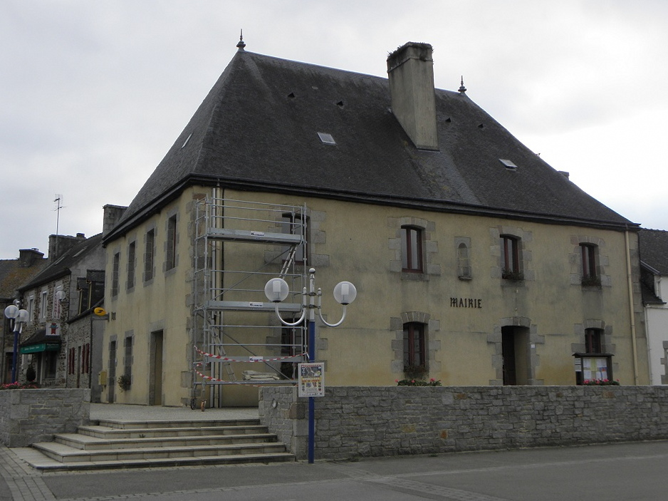 Mairie de Plouégat-Guérand (29).